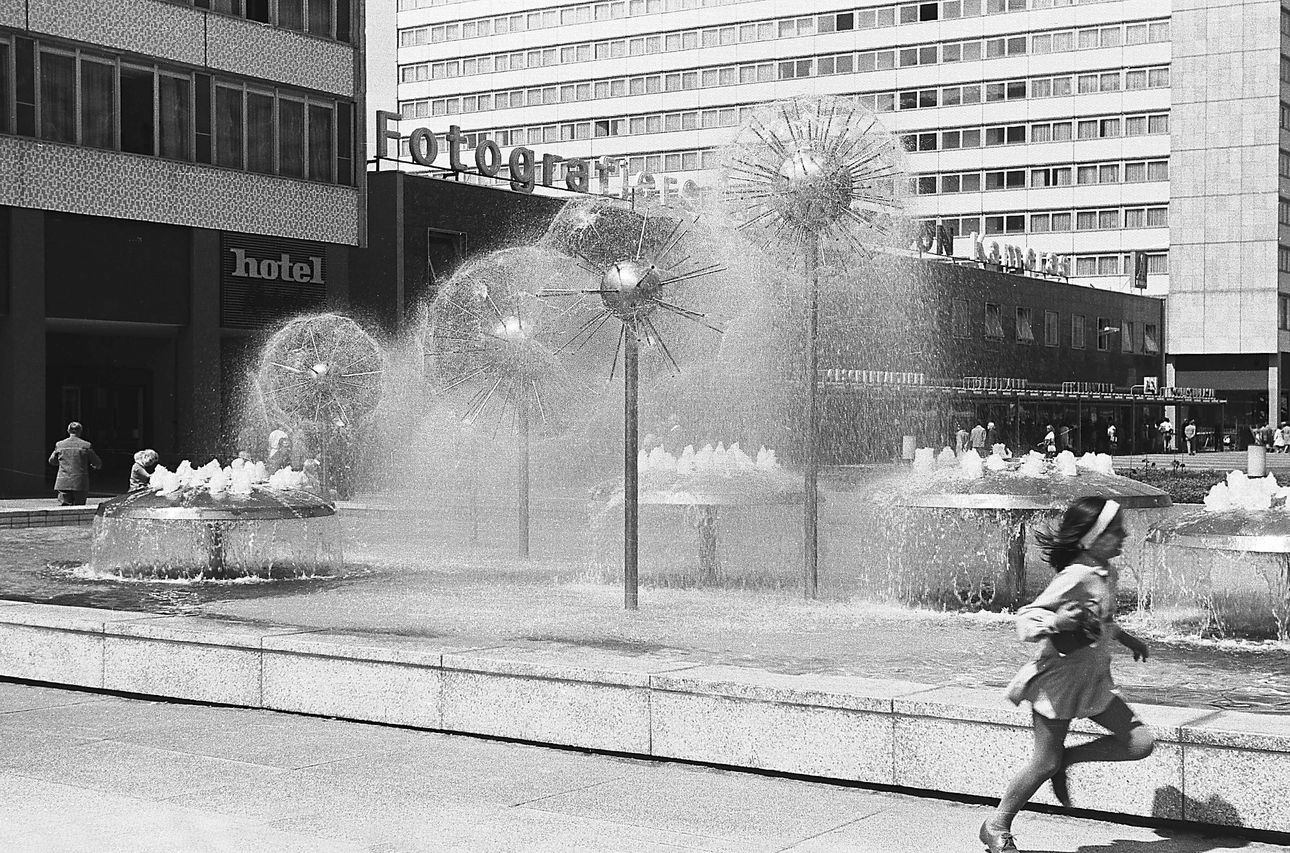 21.07.1970 8010 Dresden, Prager Straße: Vorn der Pusteblumen-Brunnen, 1969 von Leoni Wirth (GMP: 51.043773,13.735441). Links Hotel Königstein (GMP: 51.044063,13.734678), dann der Flachbau "Fotografiere mit PENTACON Kameras" (GMP: 51.044411,13.735099), rechts Hotel Lilienstein (GMP: 51.044842,13.735020). [F19700702A]19700721150NR.JPG(c)Blobelt